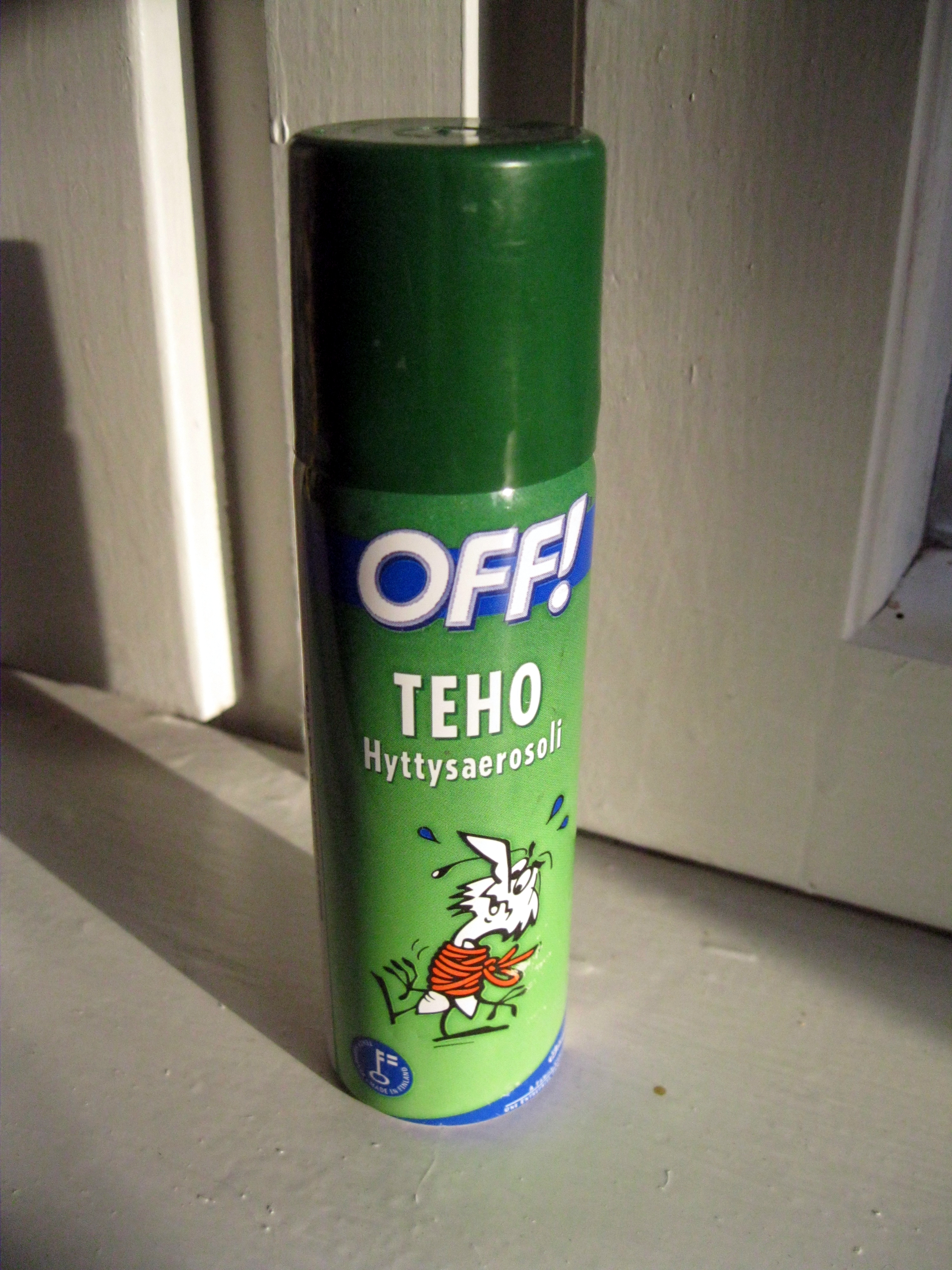 Off Hyttysaerosoli purkki.